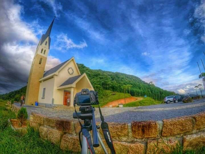 Fim de tarde na cidade de Jaraguá do Sul